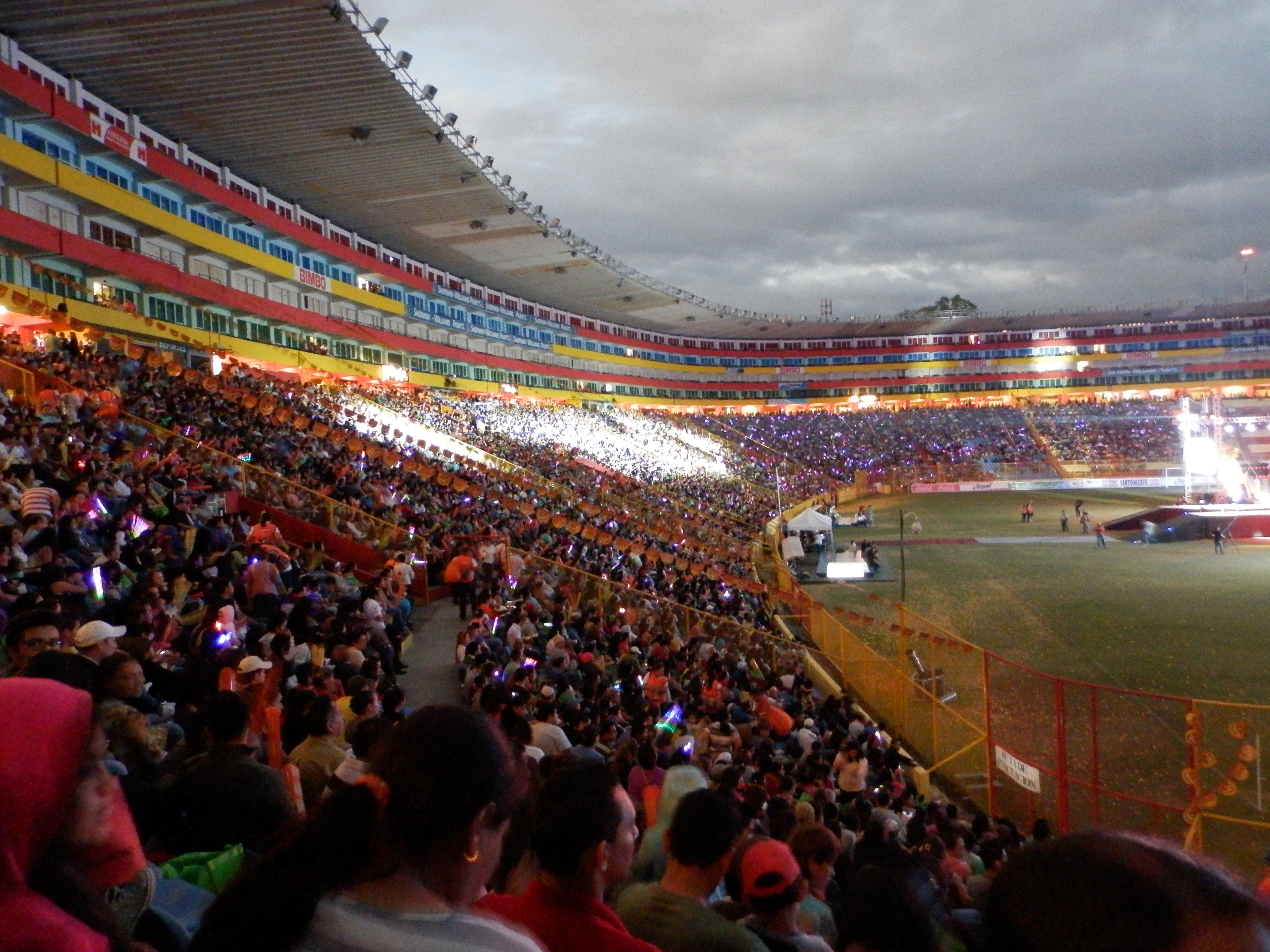 Panorama de un concierto en el Estadio Cuscatlan